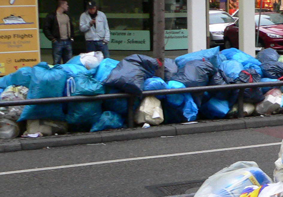 Berge von Müllsäcken am Straßenrand beim Streik der Müllabfuhr in Mannheim